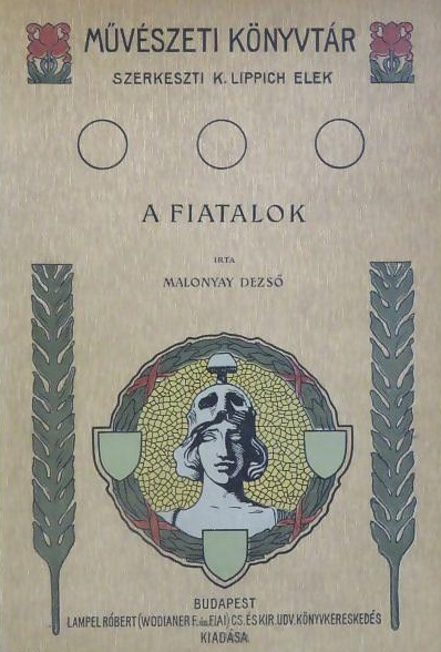 Malonyay Dezső A fiatalok, Budapest, 1906 (borítódísz szerzője nem ismert)